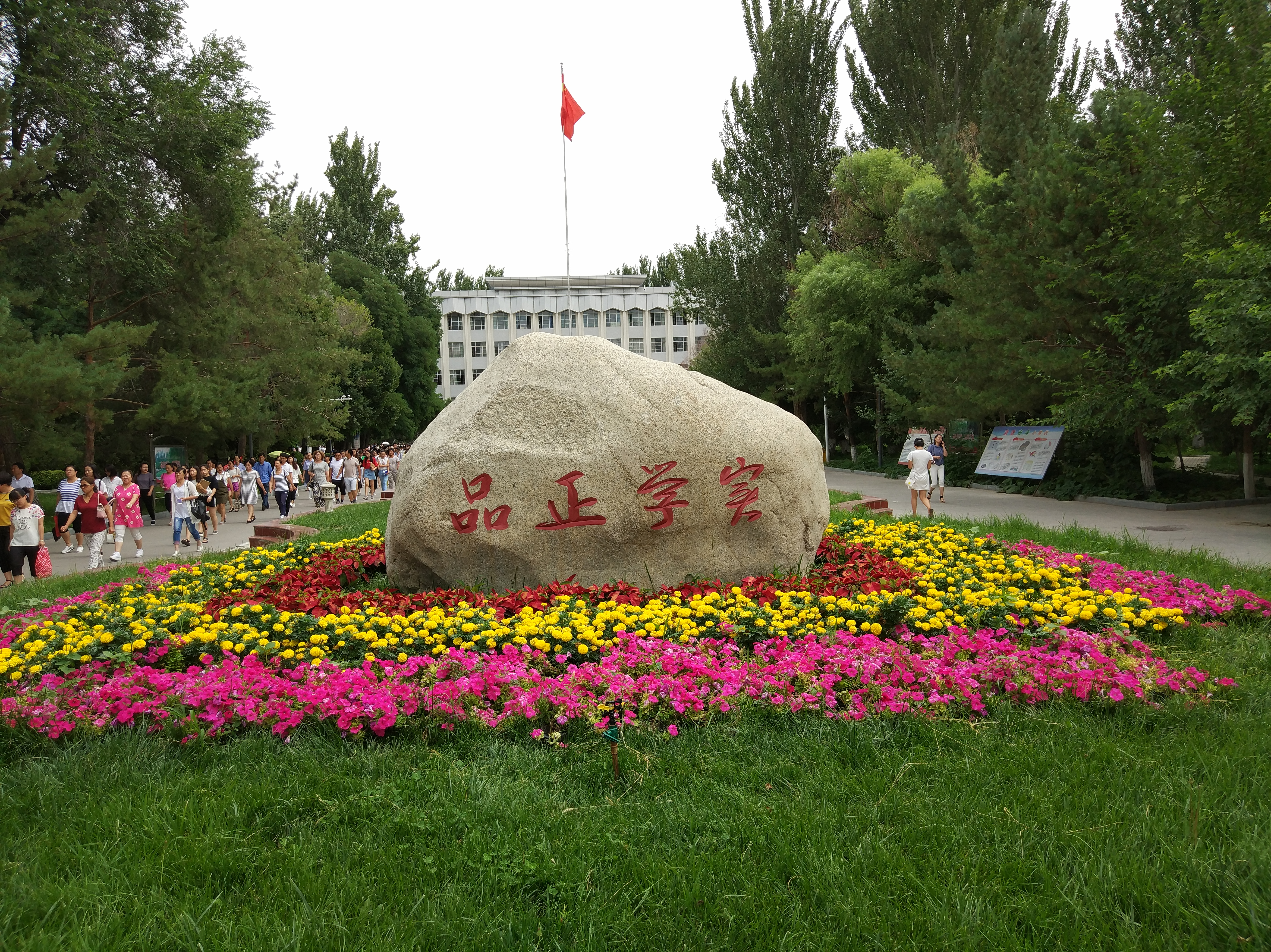 伊犁师范学院进正门后看到的石头，刻有校训“品正学实”